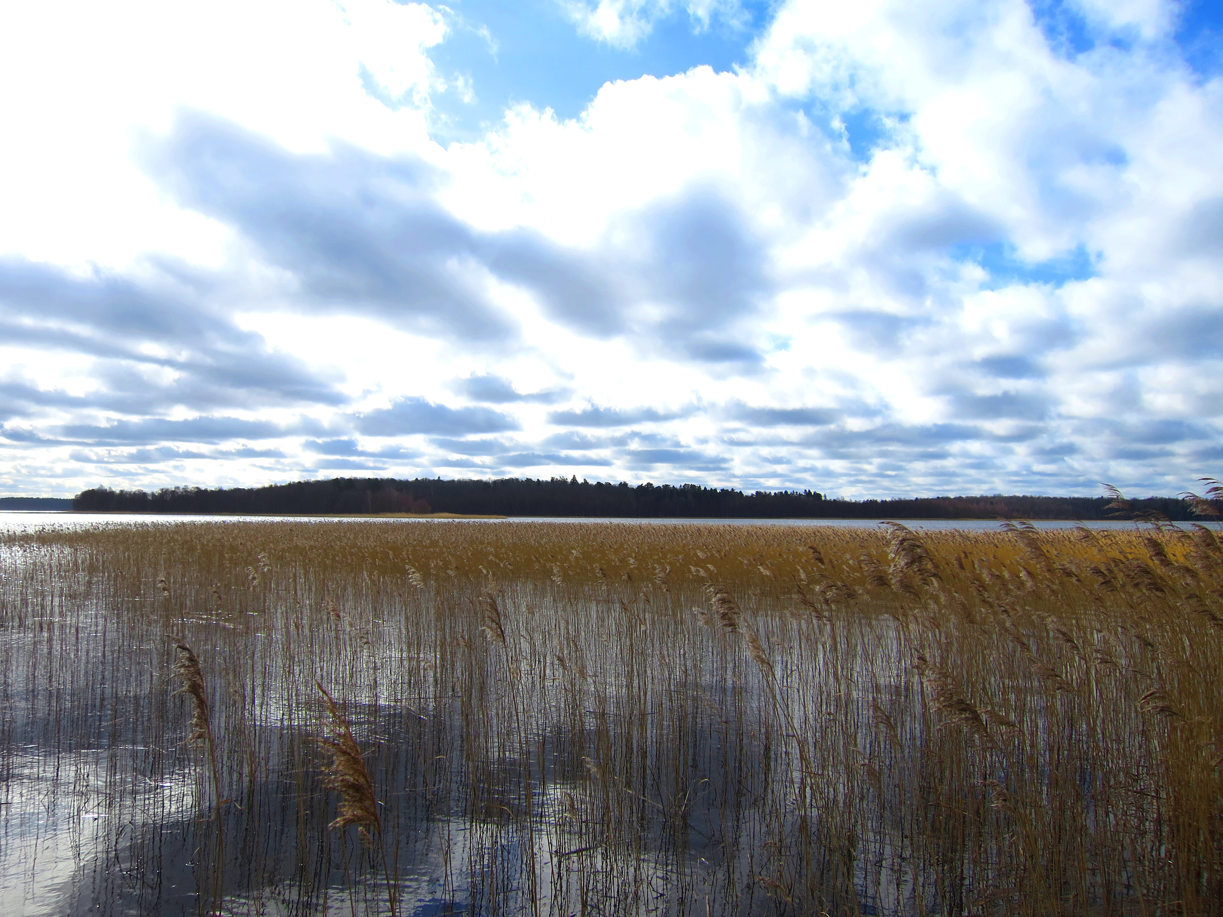 Niedrājs pie Usmas ezera